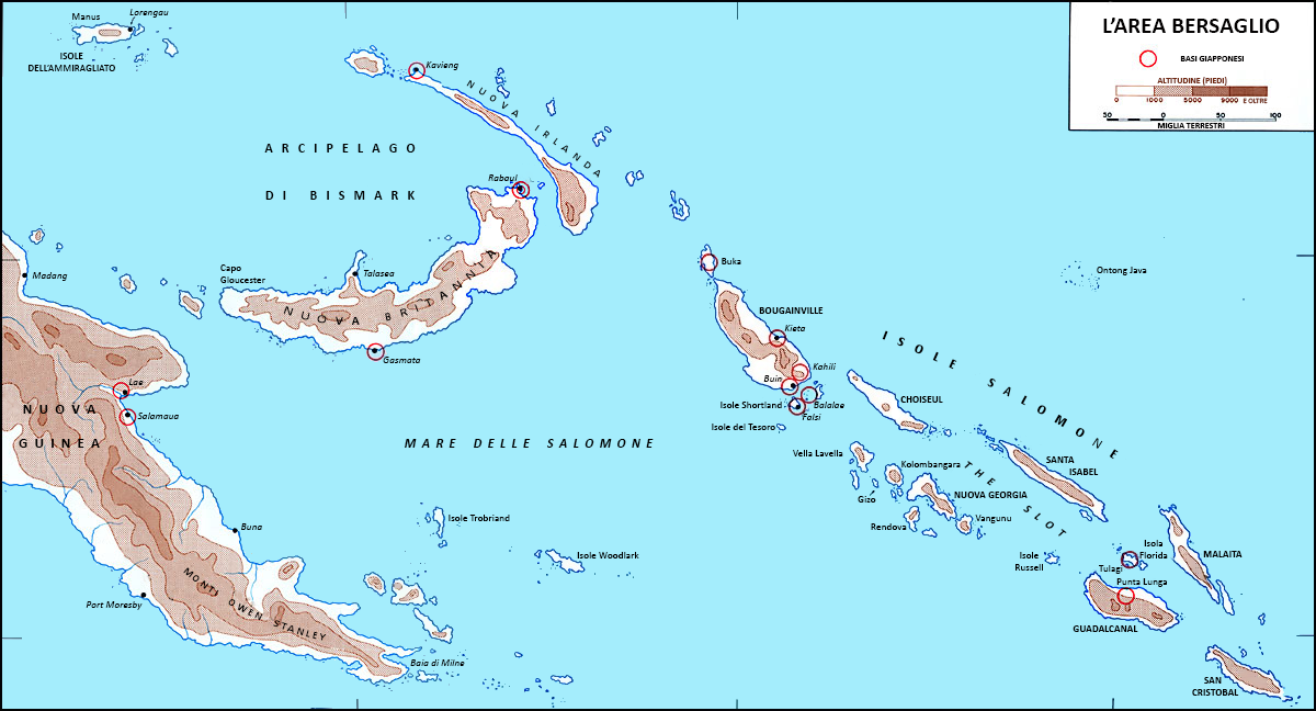 Cartina delle Isole Salomone nel 1942, prima dell'invasione di Guadalcanal. Le basi giapponesi sono cerchiate in rosso.